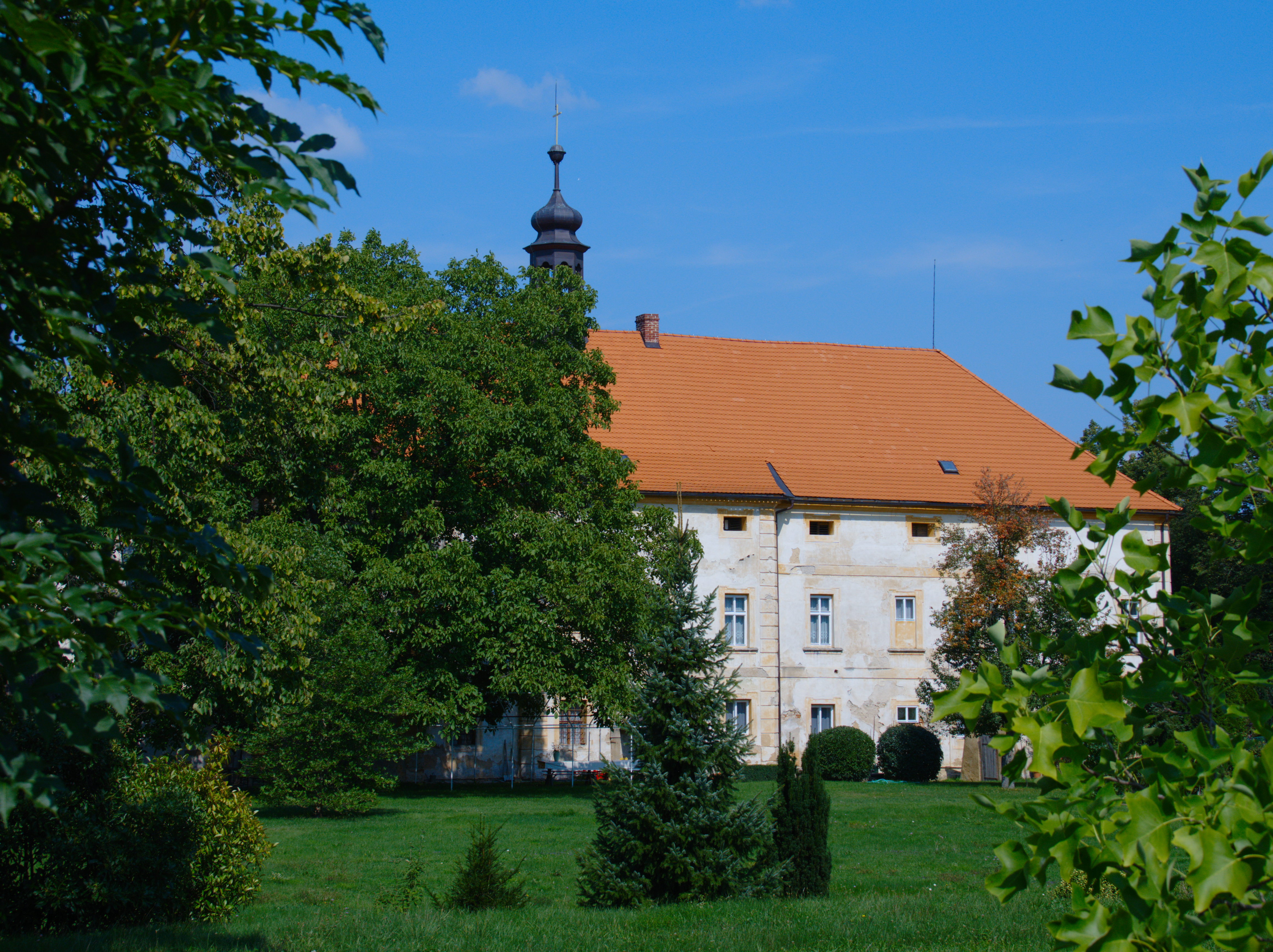 Pohled na faru ze zahrady 31.8.2019